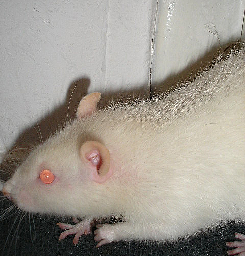 Fotograf: Benutzer:Debauchery Zeit: 13. September 2005 (Original text: Albino Hausratte (Leseratte).)